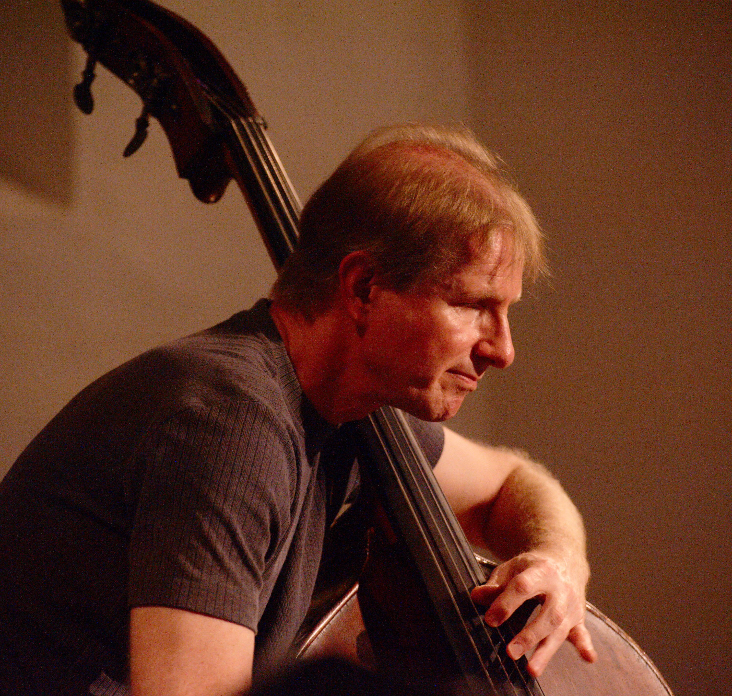 Ralf Cetto im Quartett mit Tony Lakatos, Thomas Langer und Andreas Neubauer in der Stadtkirche Darmstadt am 13. Oktober 2019